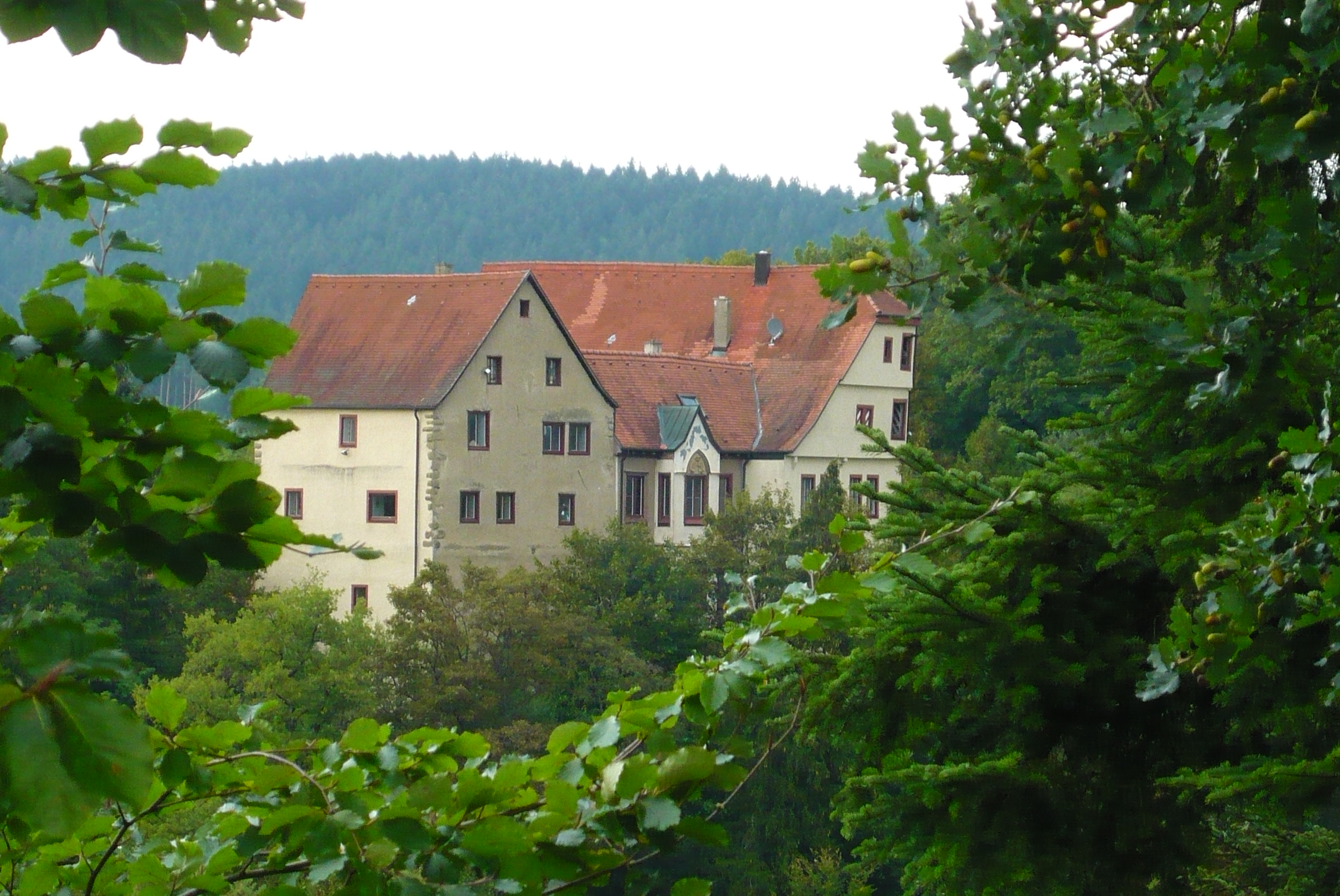 Lichtenegg Castle, view from Harthausen Schloss Lichtenegg von Harthausen gesehen